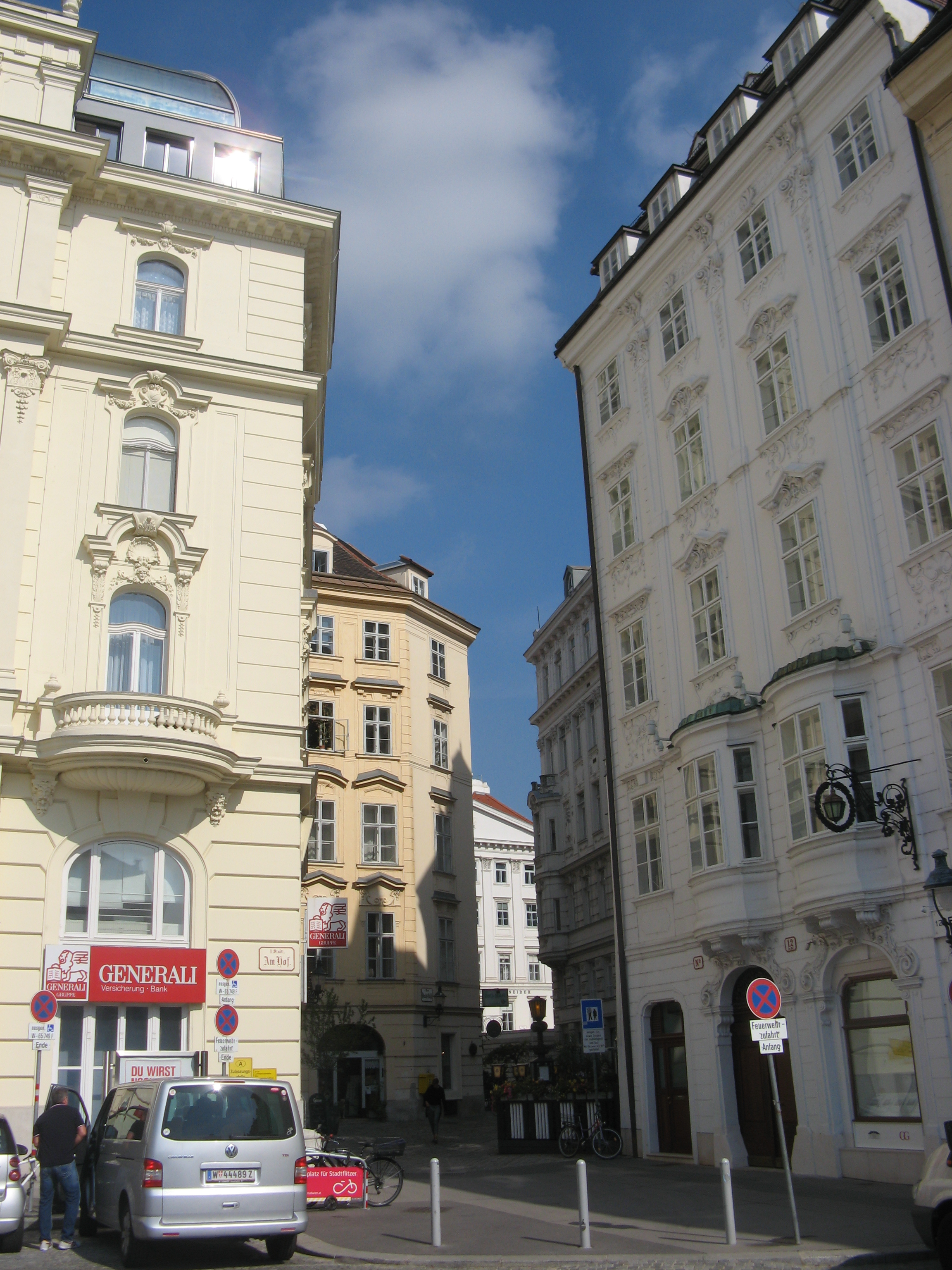 Drahtgasse vom Hof aus gesehen, Wien-Innere Stadt